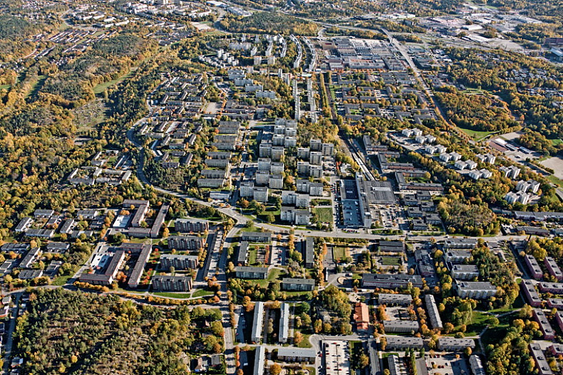 Vårberg nedtill i bildens mitt, Skärholmen i bakgrunden, vy mot ost